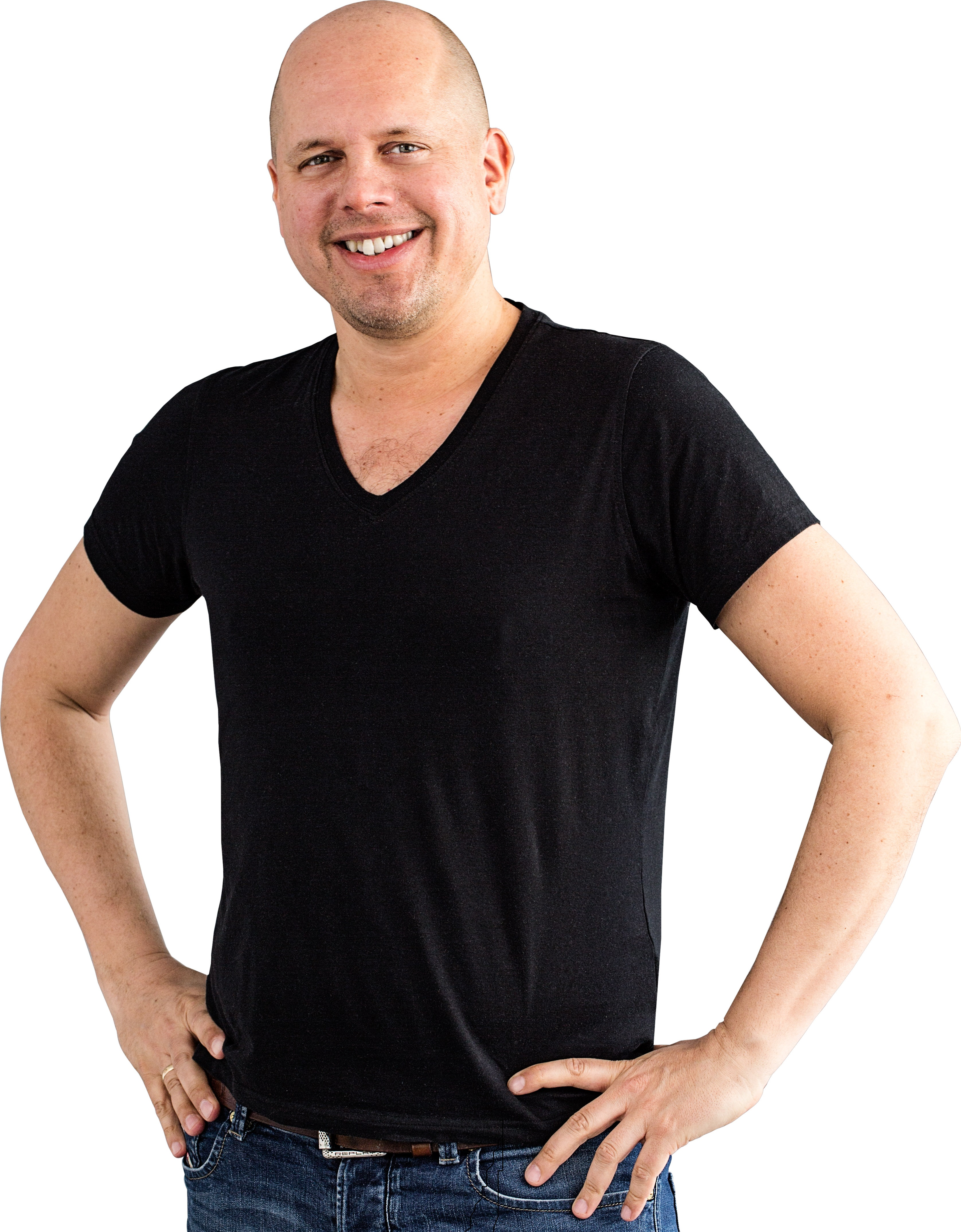 Cartoonist, Comiczeichner, Autor und Musiker Ralph Ruthe